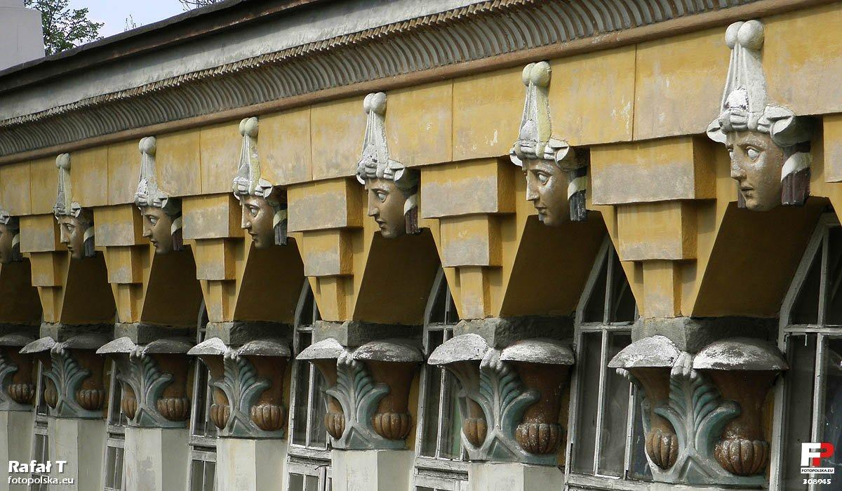 Głowy zdobiące elewację oranżerii.